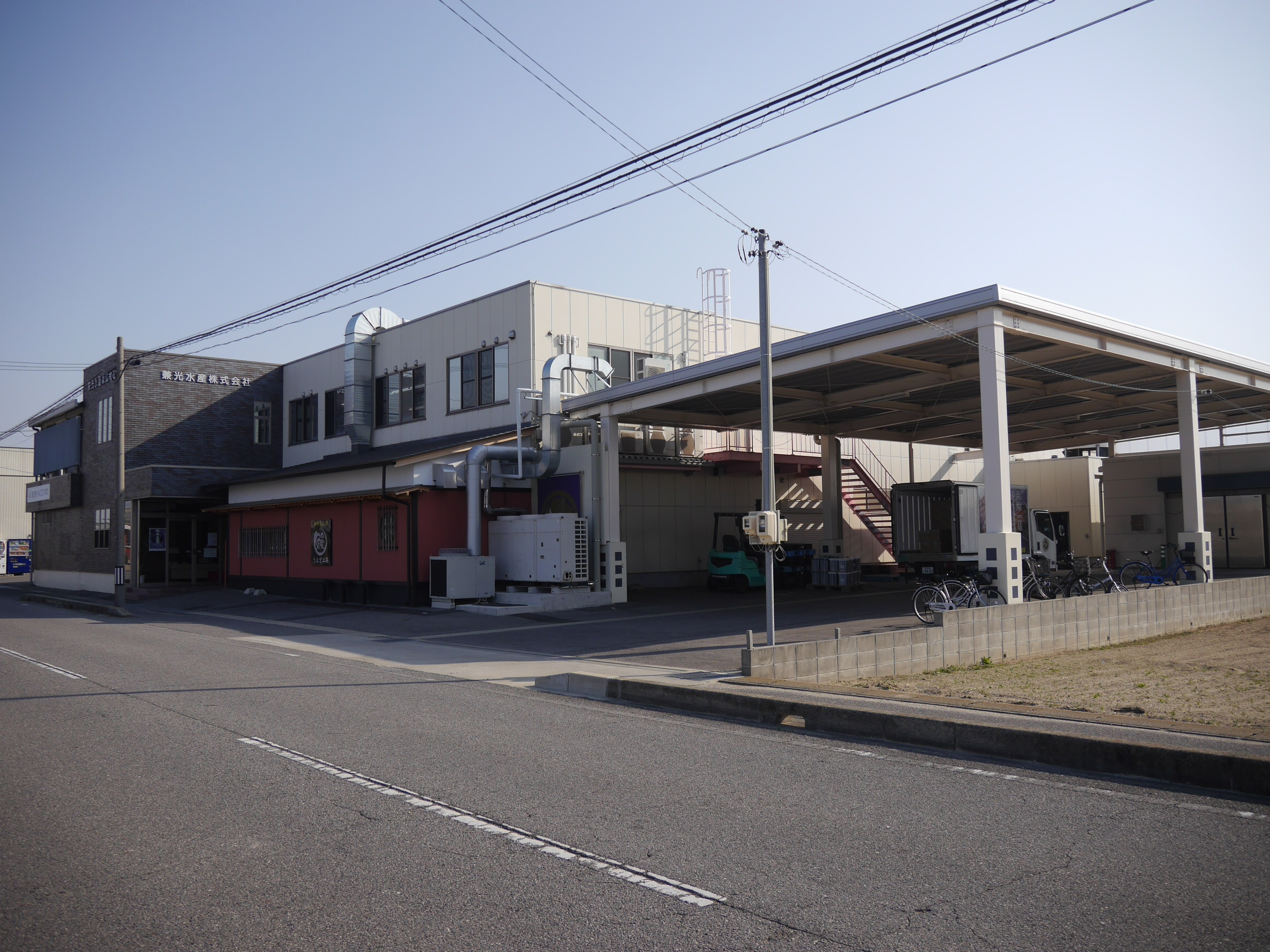 愛知県西尾市にある兼光水産本社の外観